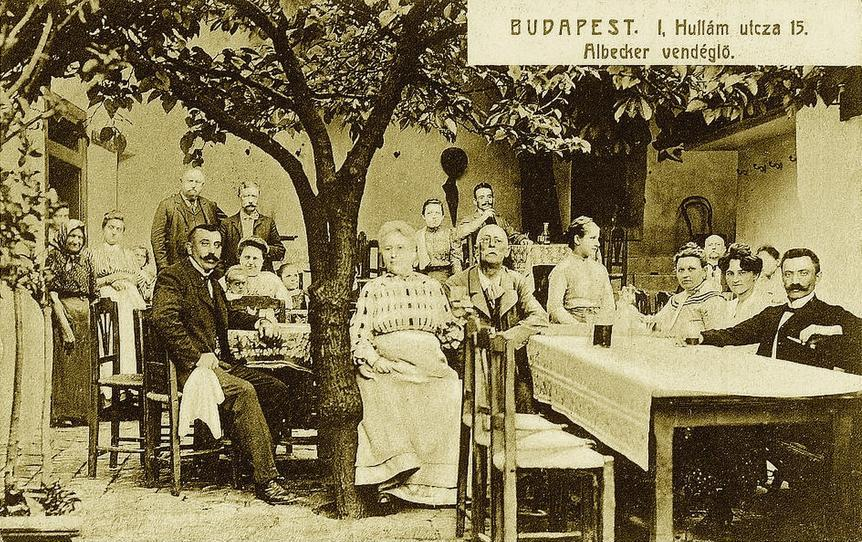 Képeslap Albecker Antal vendéglőjéről a Tabánban 1901 Hullám u 15. 1901